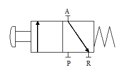 Manuellt styrdon med fjädrande återgång, ritad av Max. .